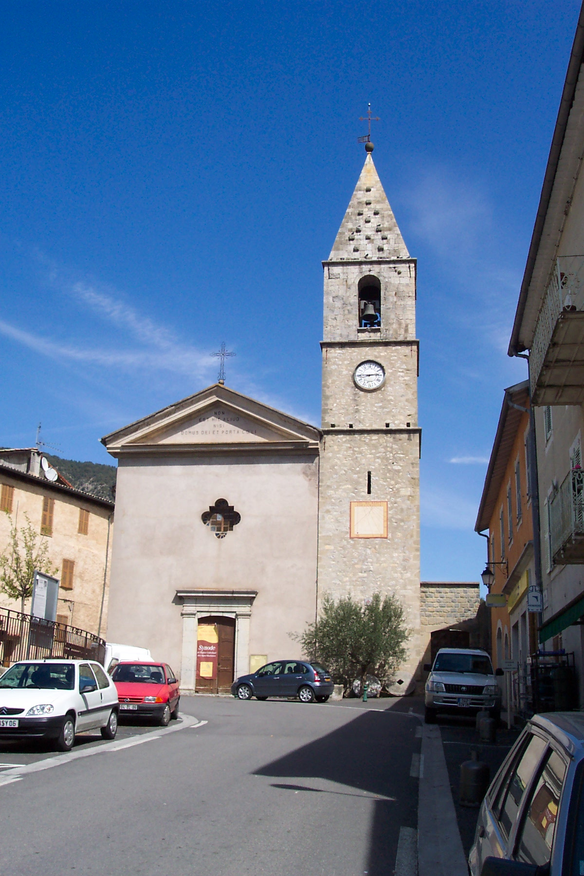 L'église Saint-Jean-Baptiste/The church